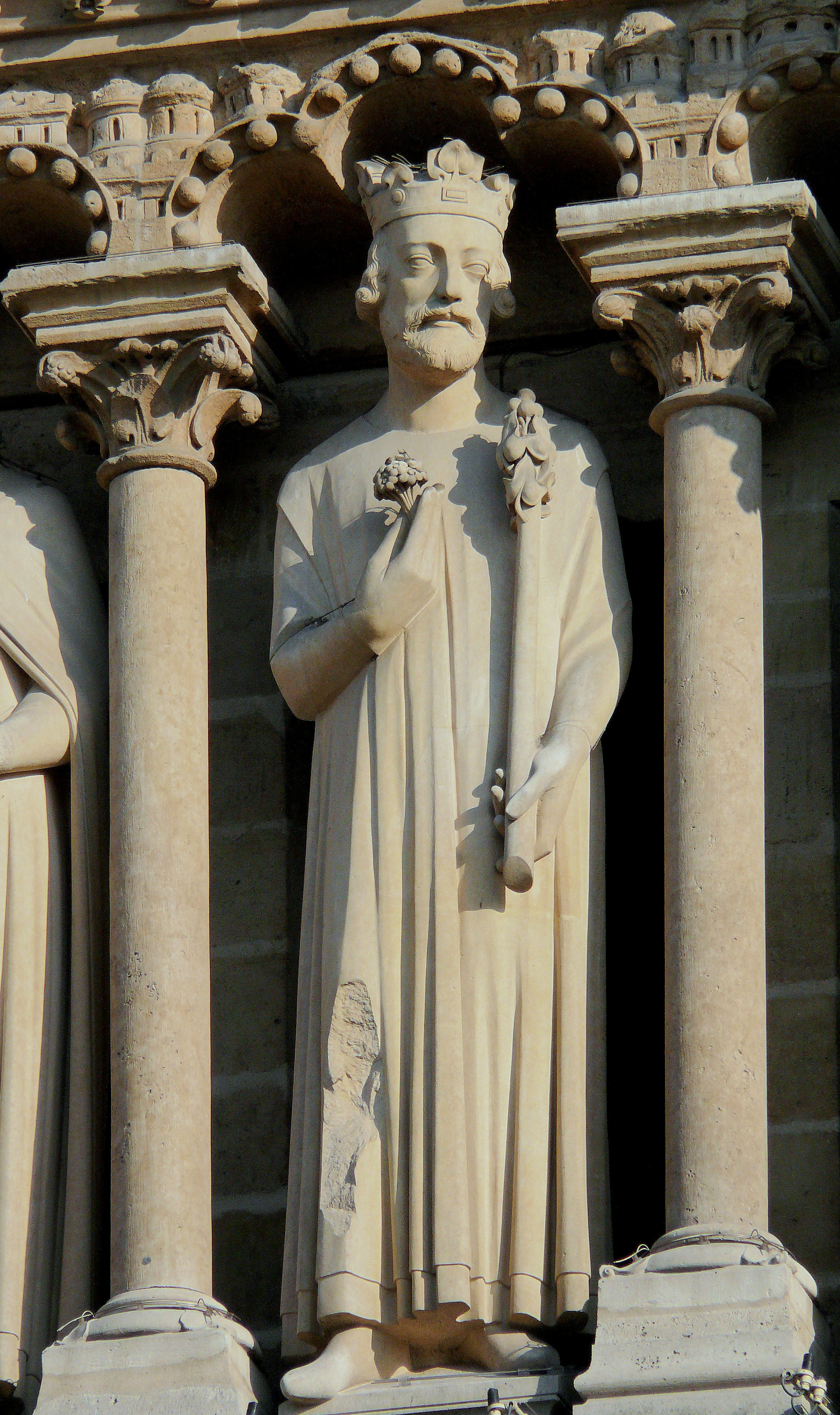 Cathédrale Notre-Dame de Paris - Façade - Galerie des rois - 8ème roi : Eugène Viollet-le-Duc représenté par le Chenillon en 1858